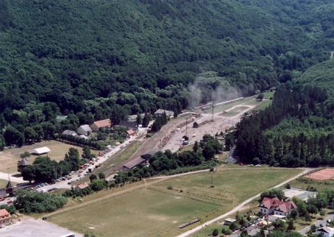 Szilvásvárad Hungary aerialphotography